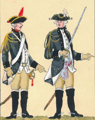 24. Regiment dragonów Buławy Wielkiej Koronnej [Dragon i oficer regimentu dragonii BWK (późniejszy 2 pułk przedniej straży)]